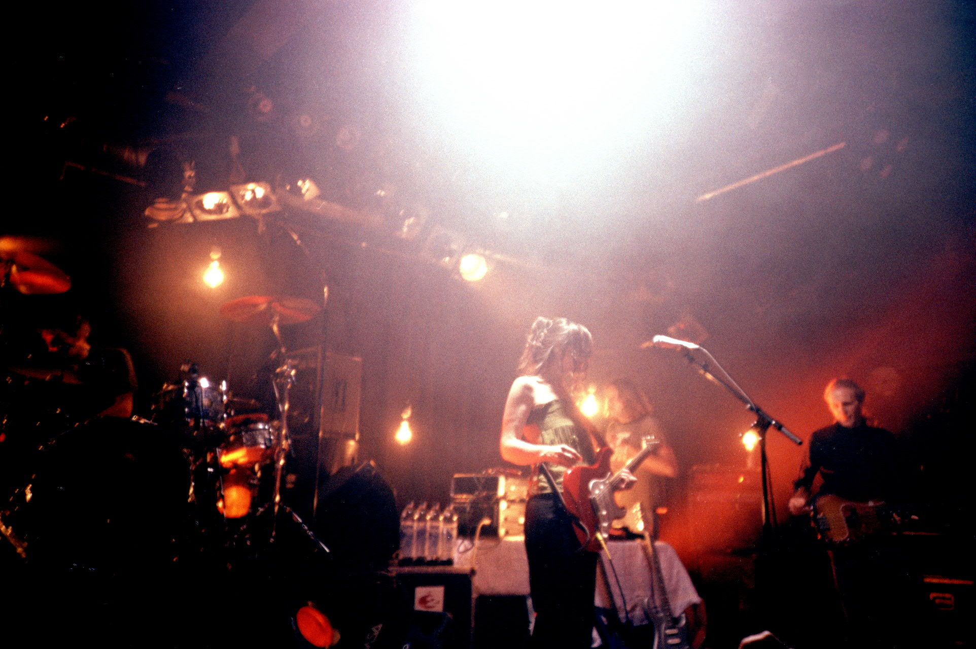 Cranes in Willem II, 's-Hertogenbosch